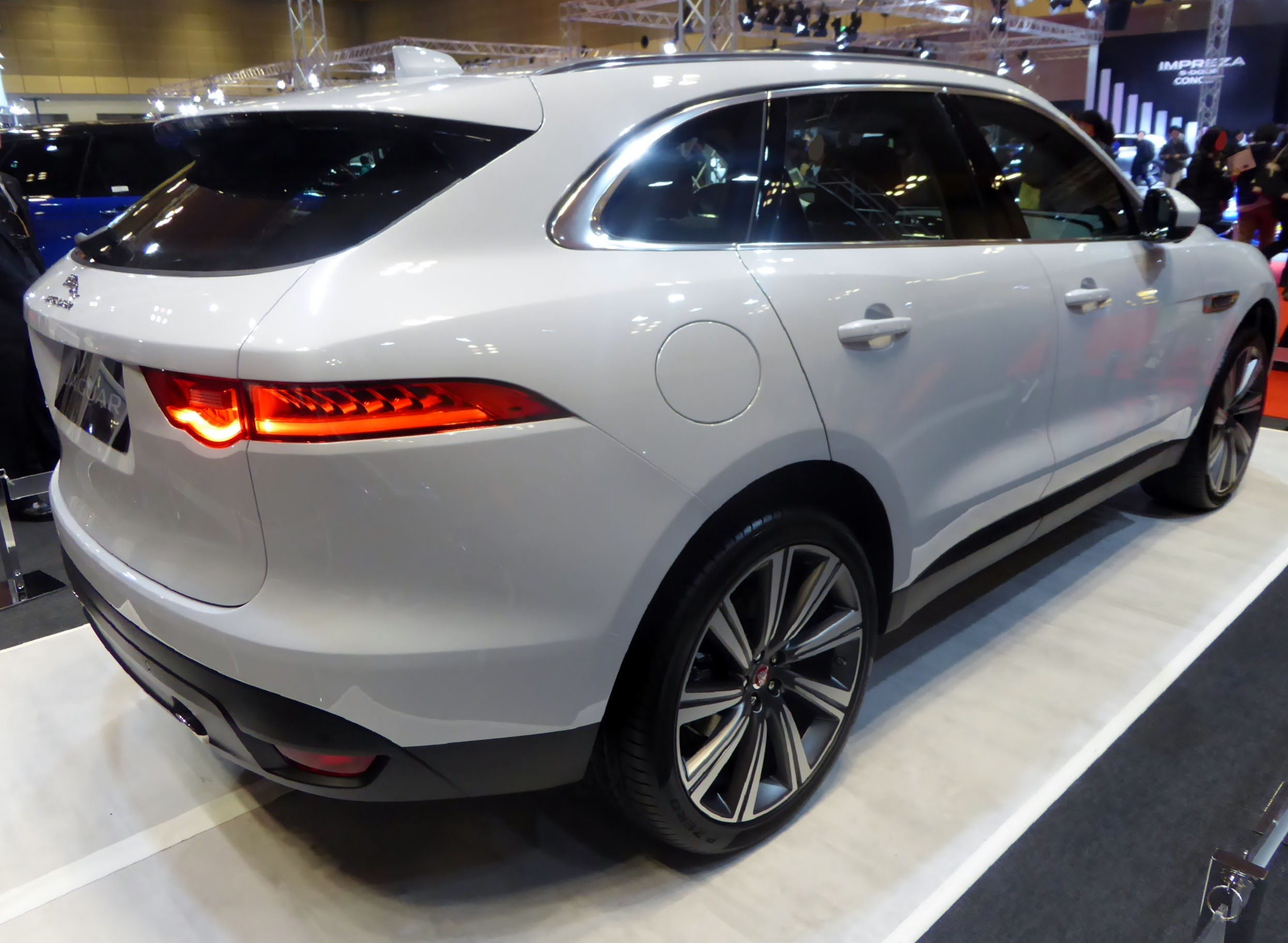 大阪モーターショー2015においてジャガー・F-ペースを撮影。